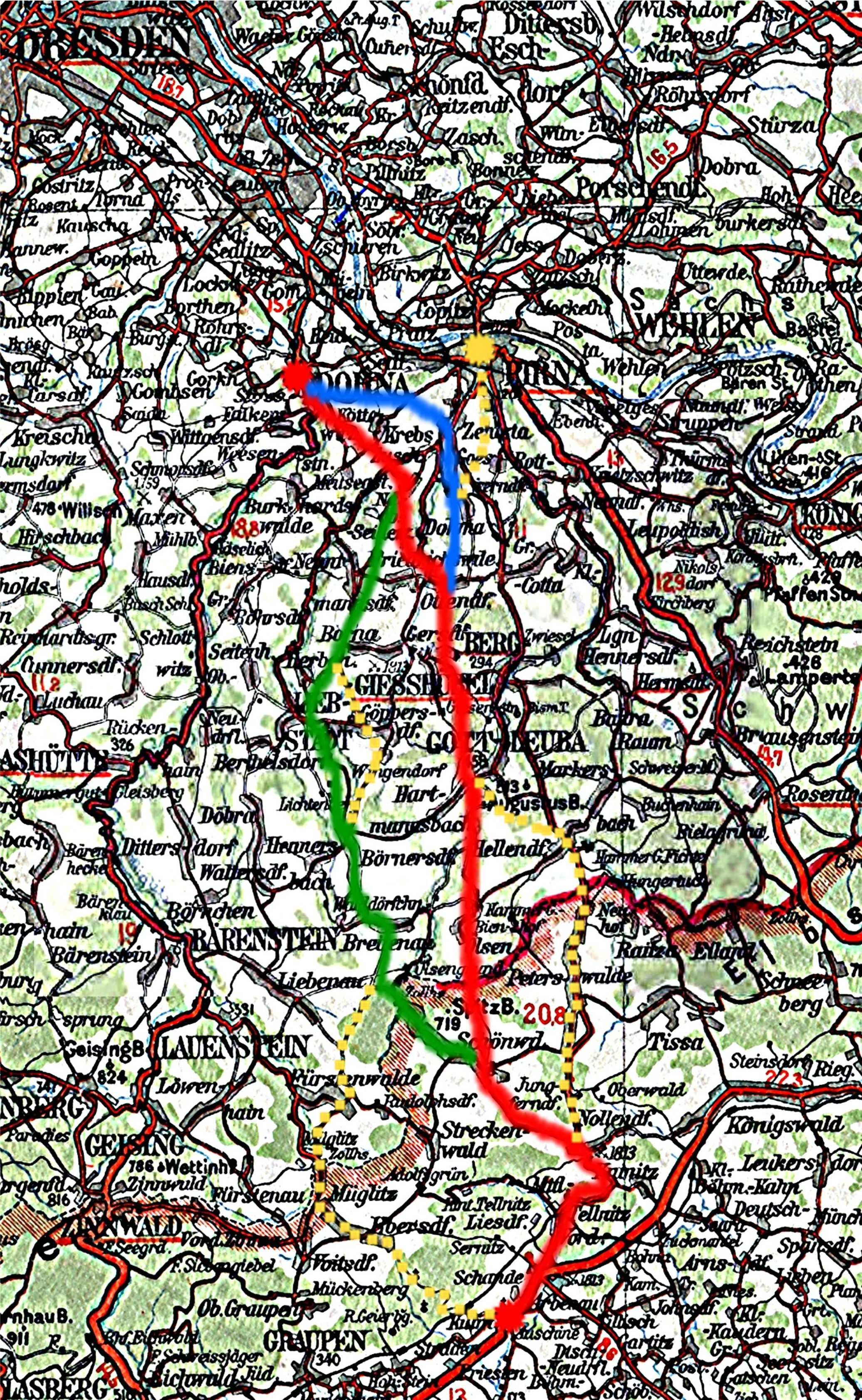 Kulmer Steig Der Kartenausschnitt wurde eingescannt vom Autor von der in seinem Besitz befindlichen: Grossen Continental-Sonderkarte Karte 7 - Freistaat Sachsen (1 : 300.000) der Continental Caoutchouc-Compagnie G.m.b.H. Hannover aus dem Jahre 1925 oder 1929 Nach über 70 Jahren sind aus Sicht des Autors die Copyright-Rechte ausgelaufen. Sollte dies juristisch nicht haltbar sein, würde der Autor versuchen, eine Einverständnis-Erklärung beim Rechtsnachfolger der o. g. Firma (falls ein solcher existiert) einzuholen. --Gert Hänsel 12:50, 18. Feb 2005 (CET)